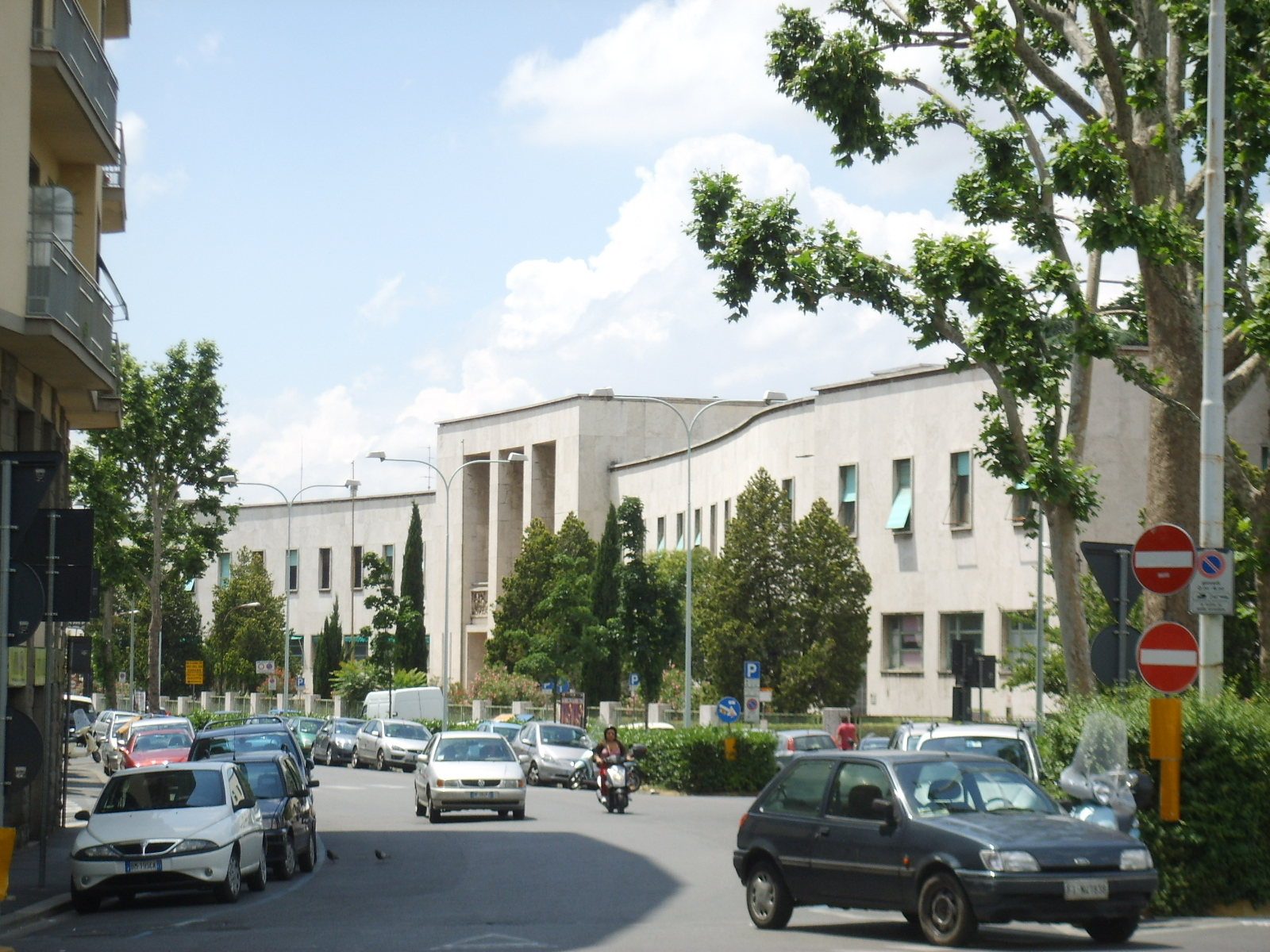 Manifattura tabacchi firenze, view